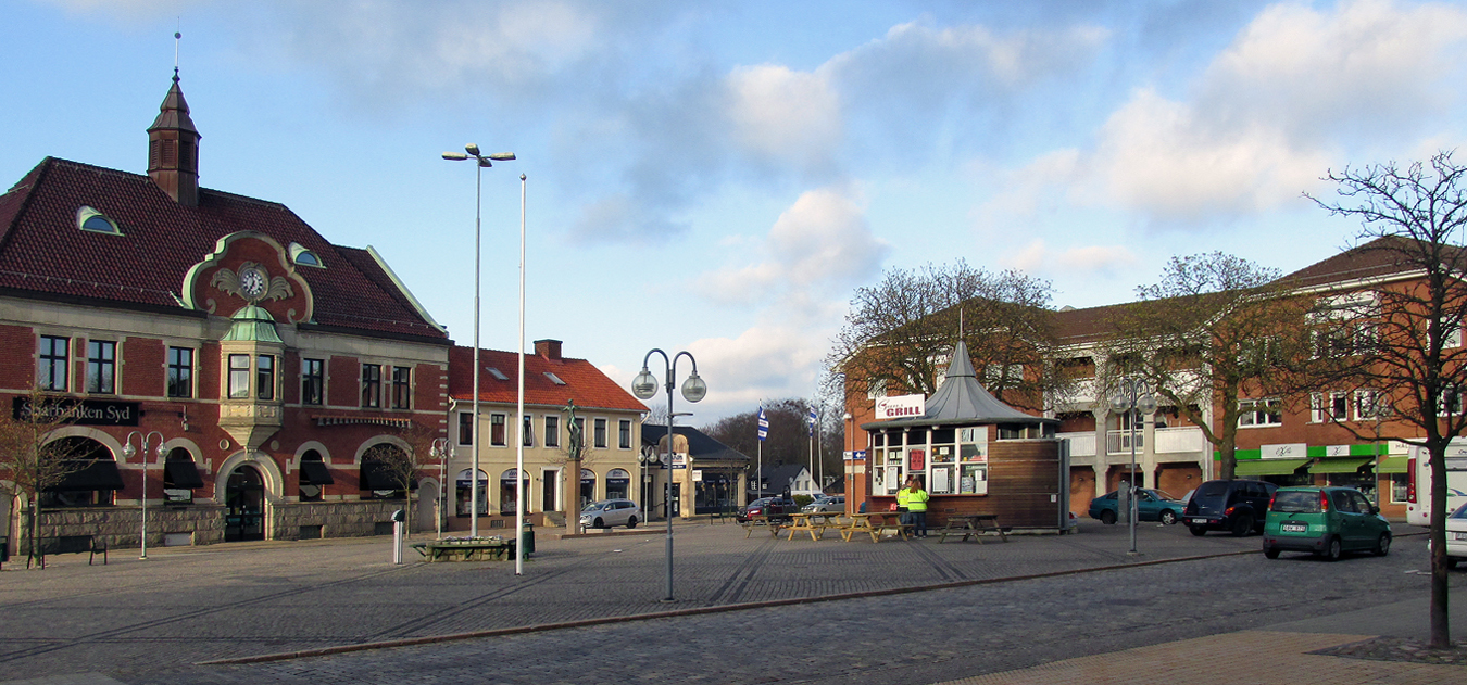 Stortorget i Tomelilla 18 April 2014